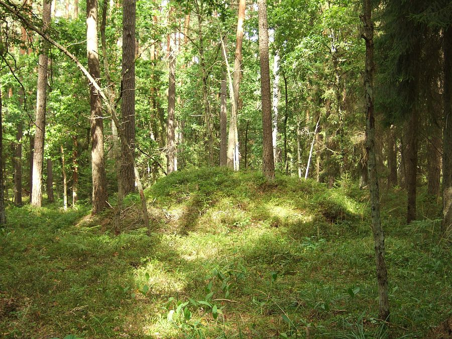 Drabužninkų pilkapiai